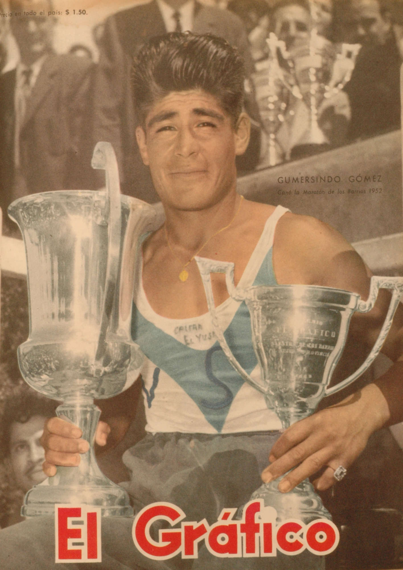 El Grafico del 19 de Diciembre de 1952. Edicion 1741